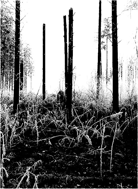 Le fin du temps - Winterwald